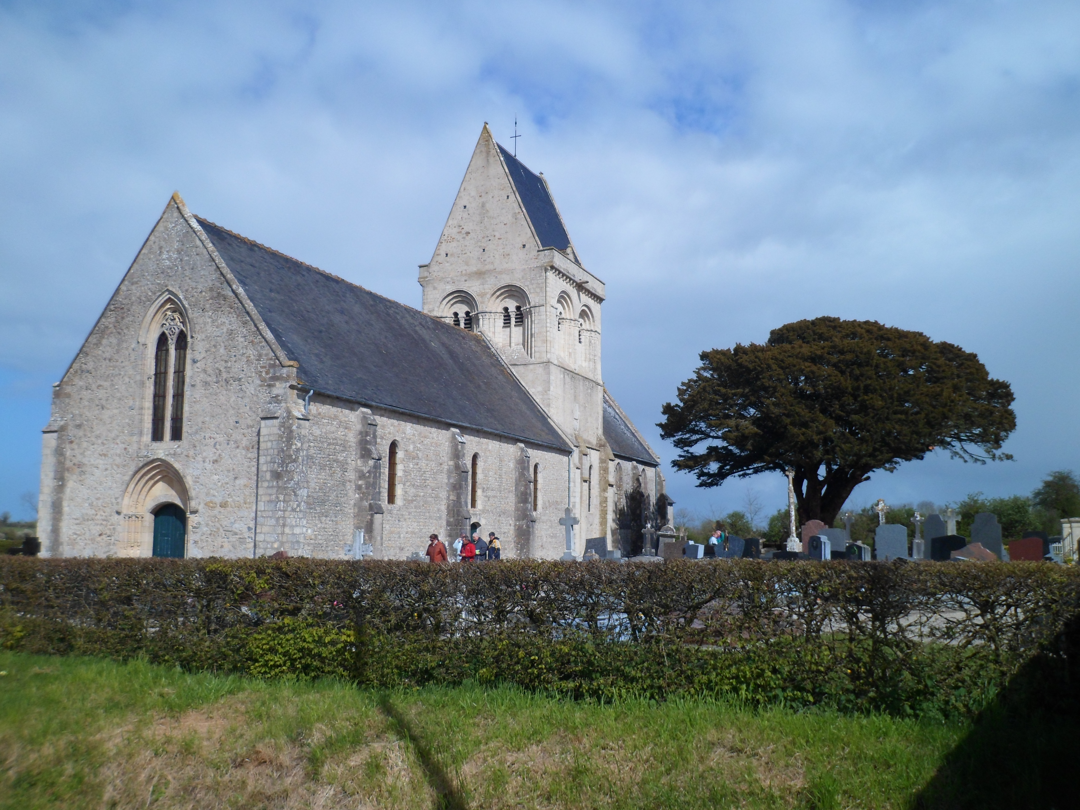 Église Saint-Hilaire de Brucheville